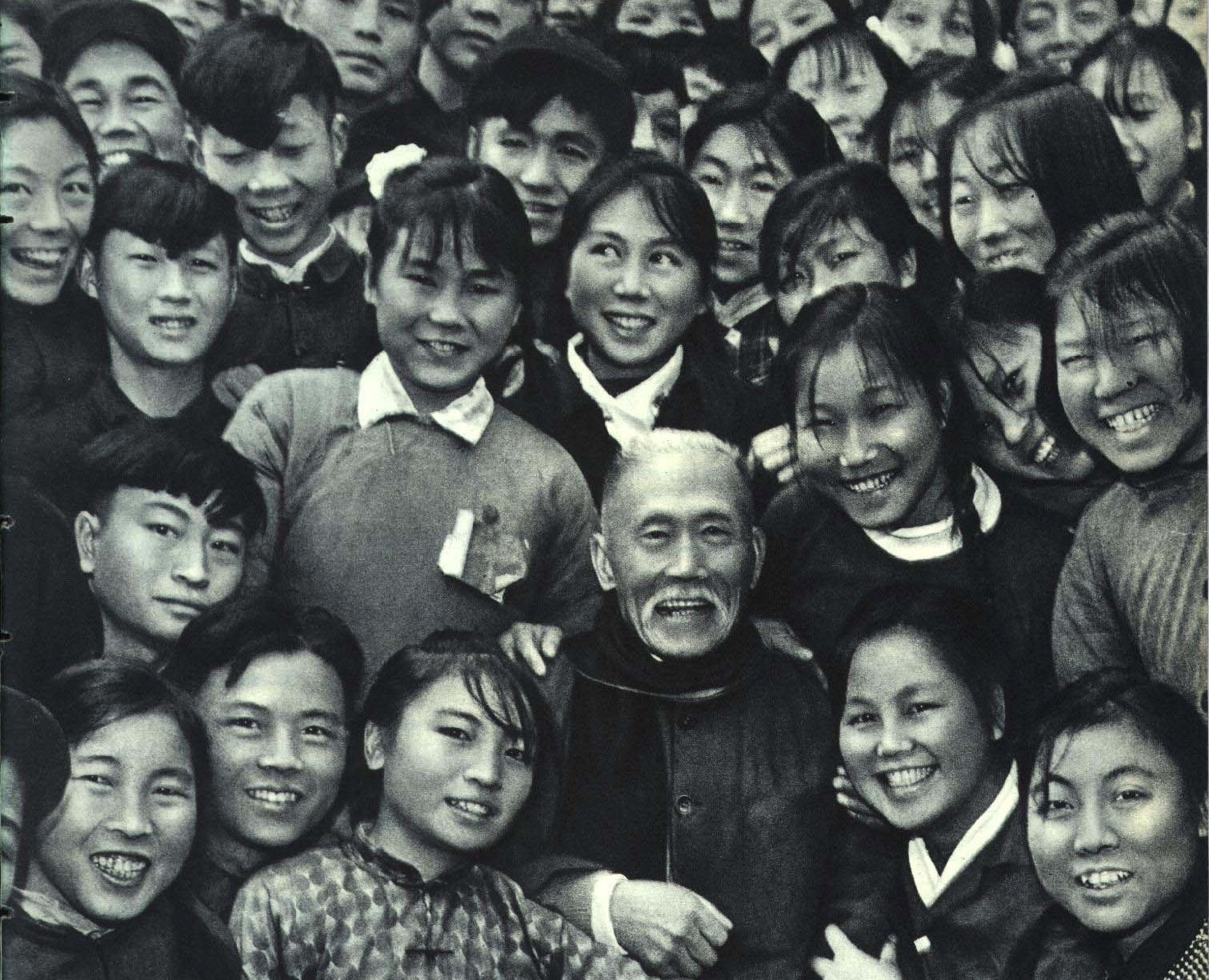 1963-03 1963年 湖南第一师范学院 徐特立